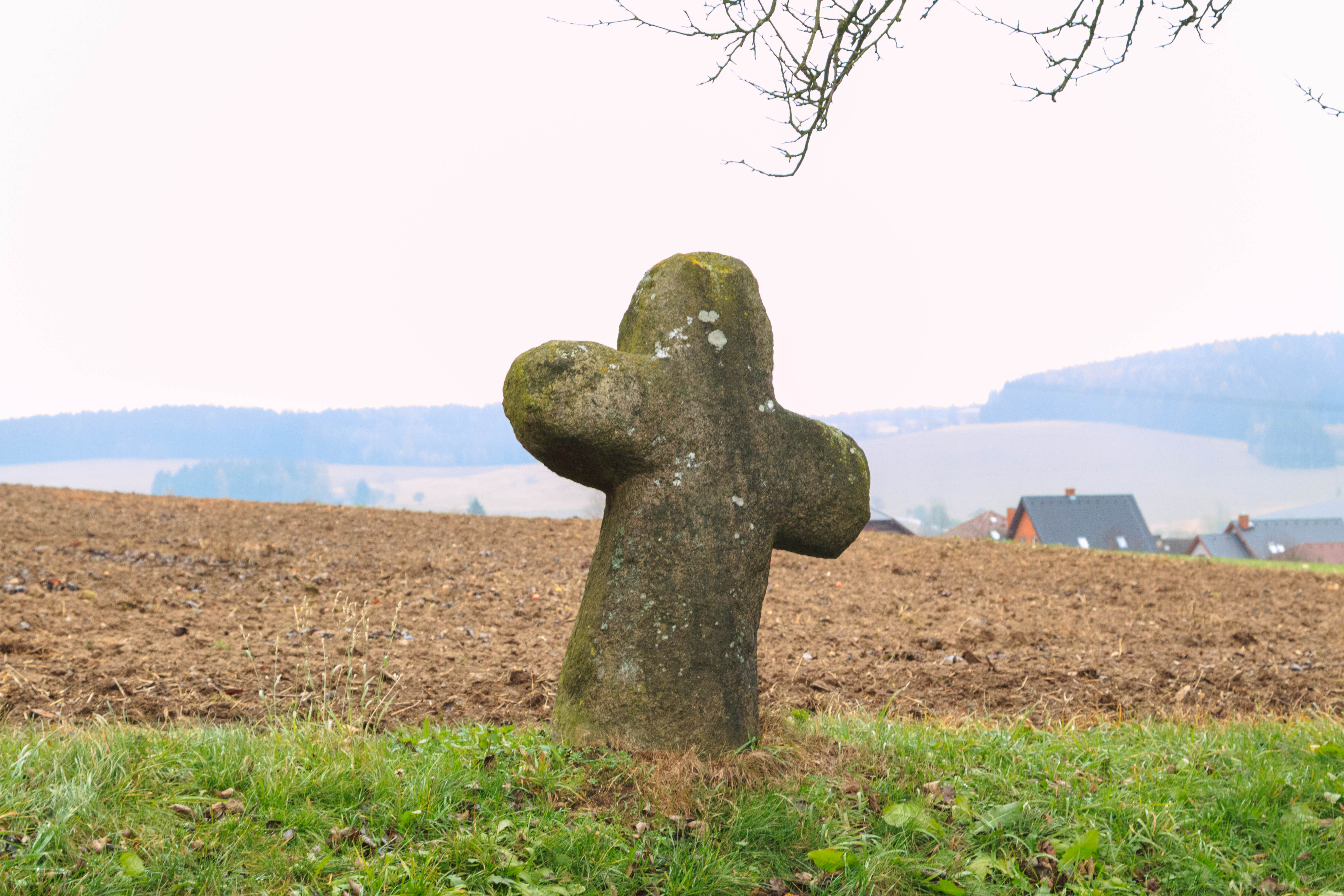 Smírčí kříž, Lučice (okres Havlíčkův Brod).